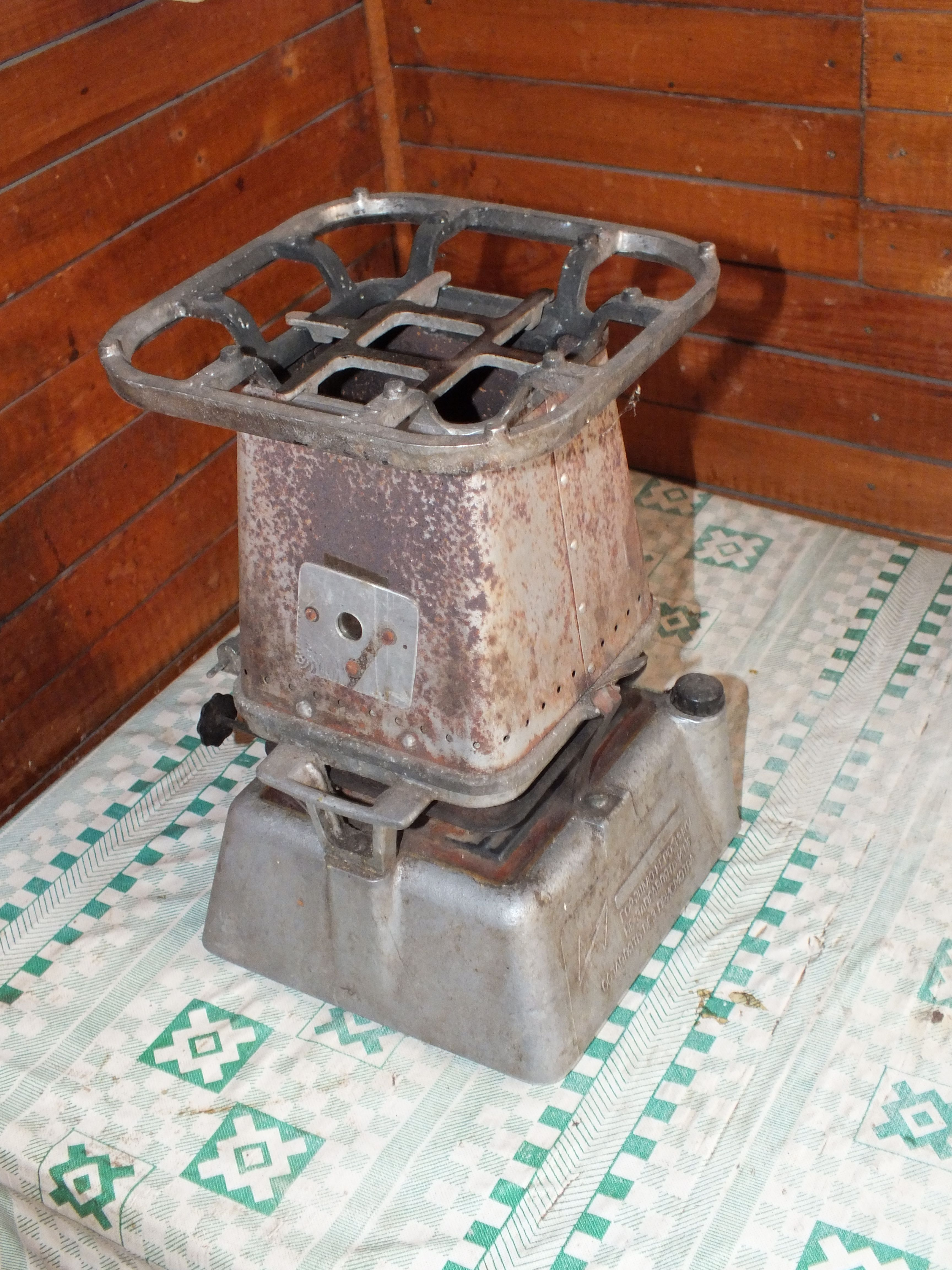 Керосинка